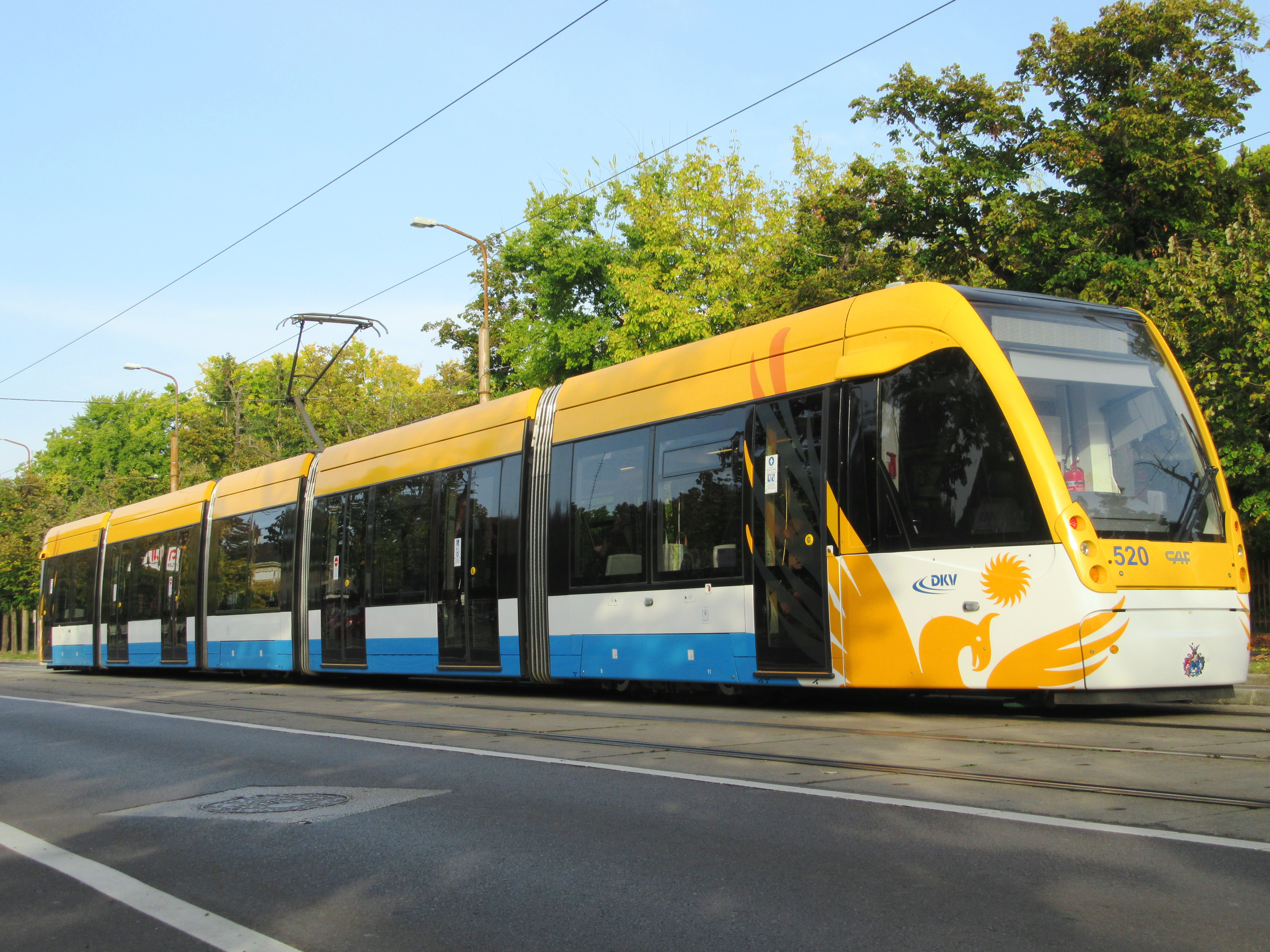 Debrecen villamos